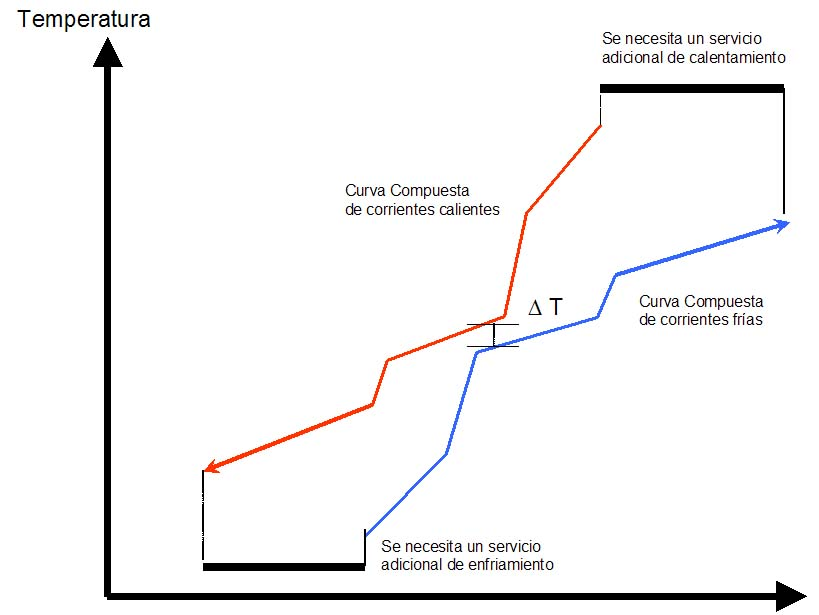 Curvas compuestas Very basic drawing showing the behavior of heat transfer, using composite curves.